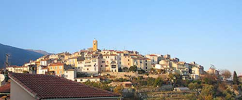 Photo du village de Gattières, 06